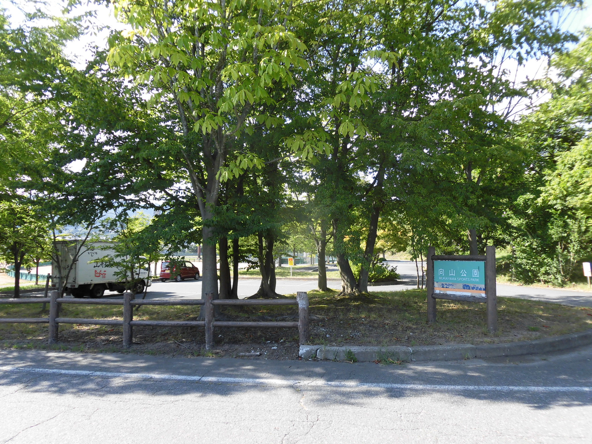 向山公園。山形県南陽市宮内に所在。運動公園。